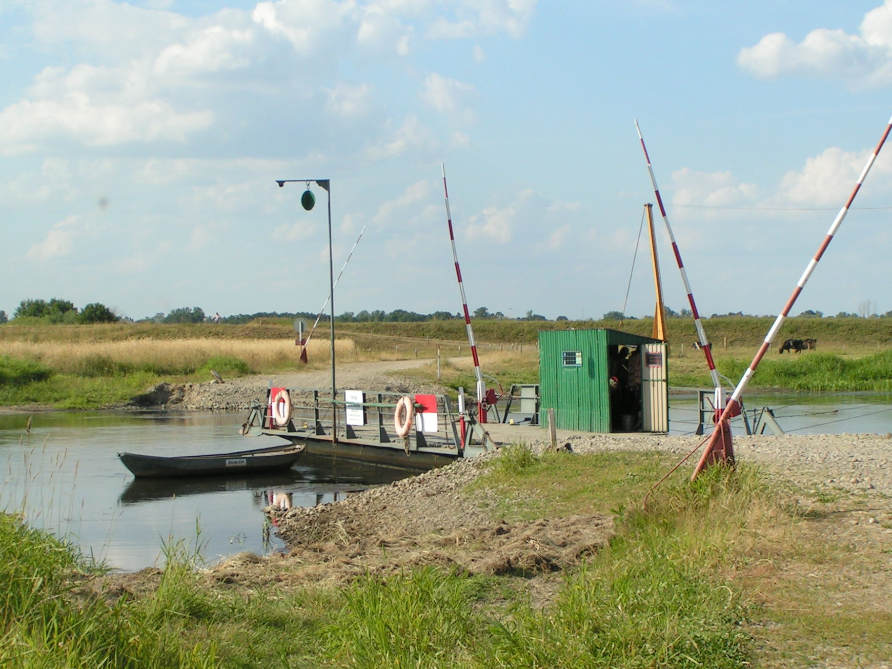 prom na rzece Warcie we Wakach